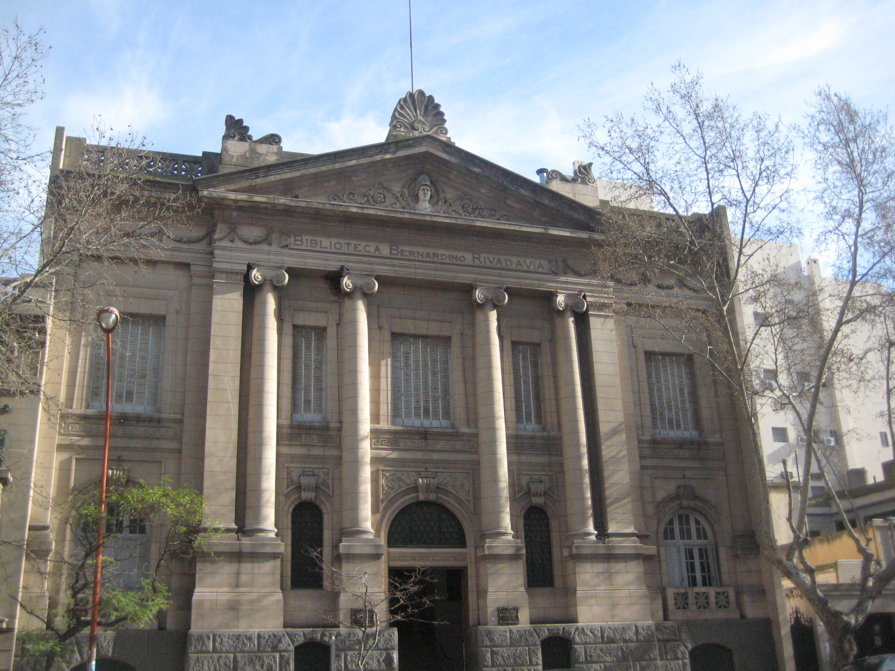 Biblioteca Bernardino Rivadavia